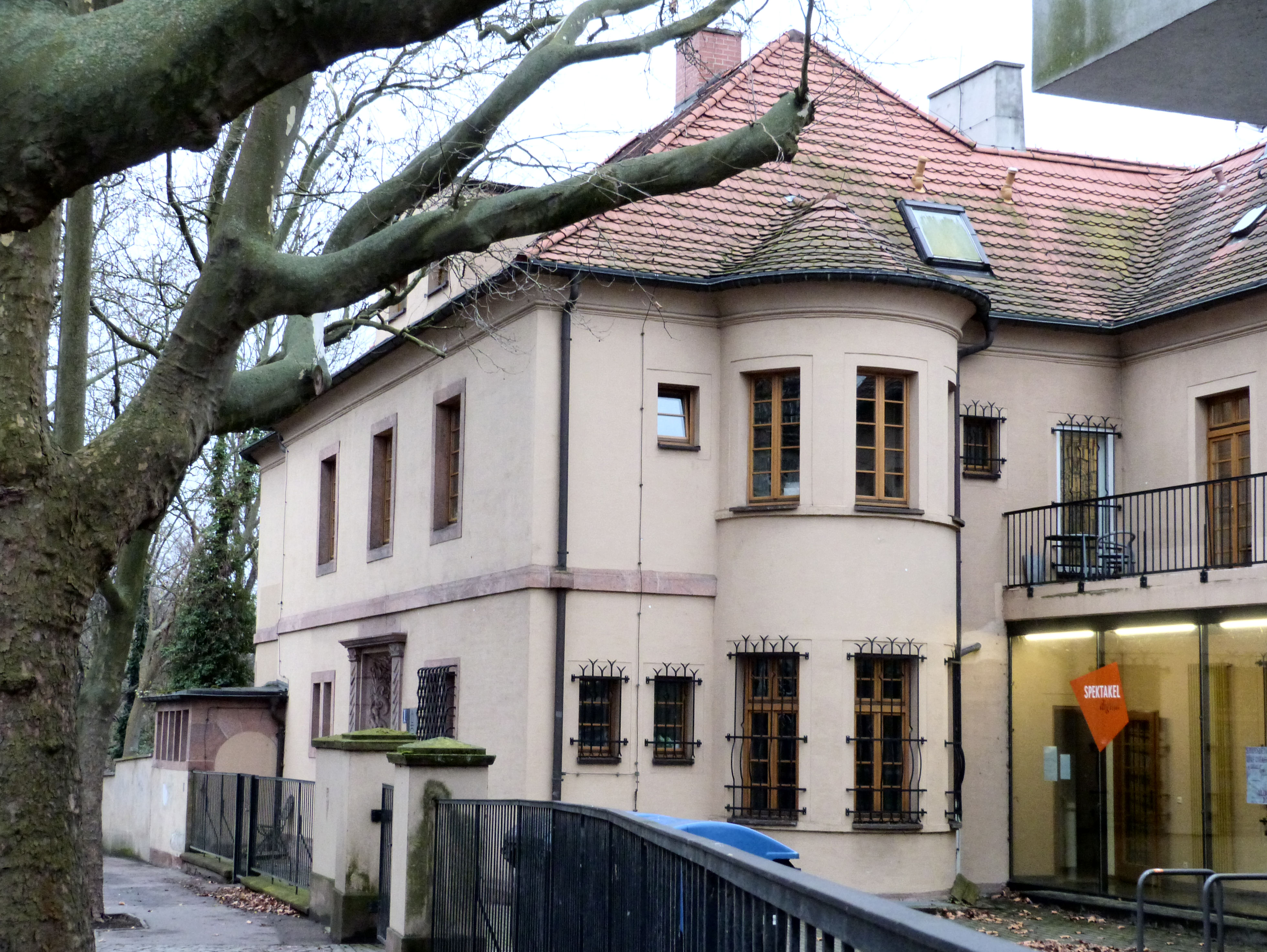 Villa Neuwerk 1, Halle (Saale), Medienzentrum der Kunsthochschule